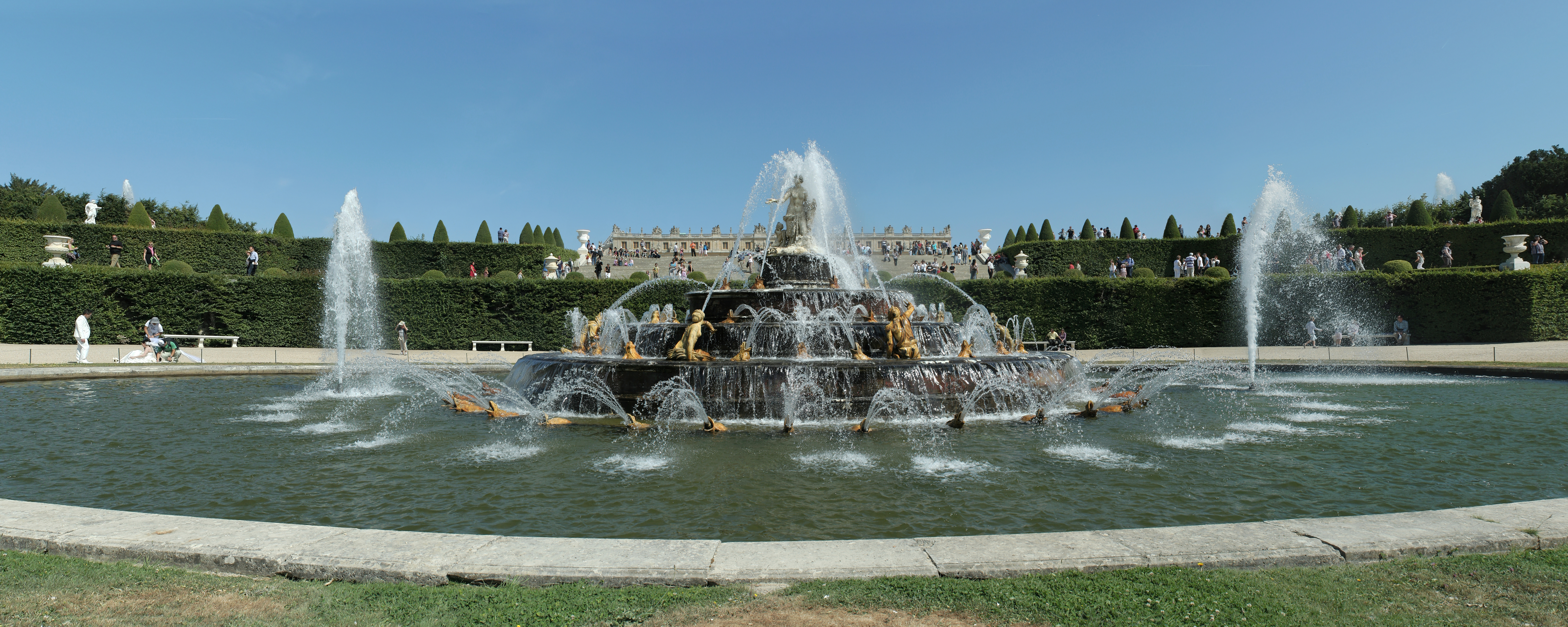 Parc de Versailles, parterre de Latone. Bassin de Latone.